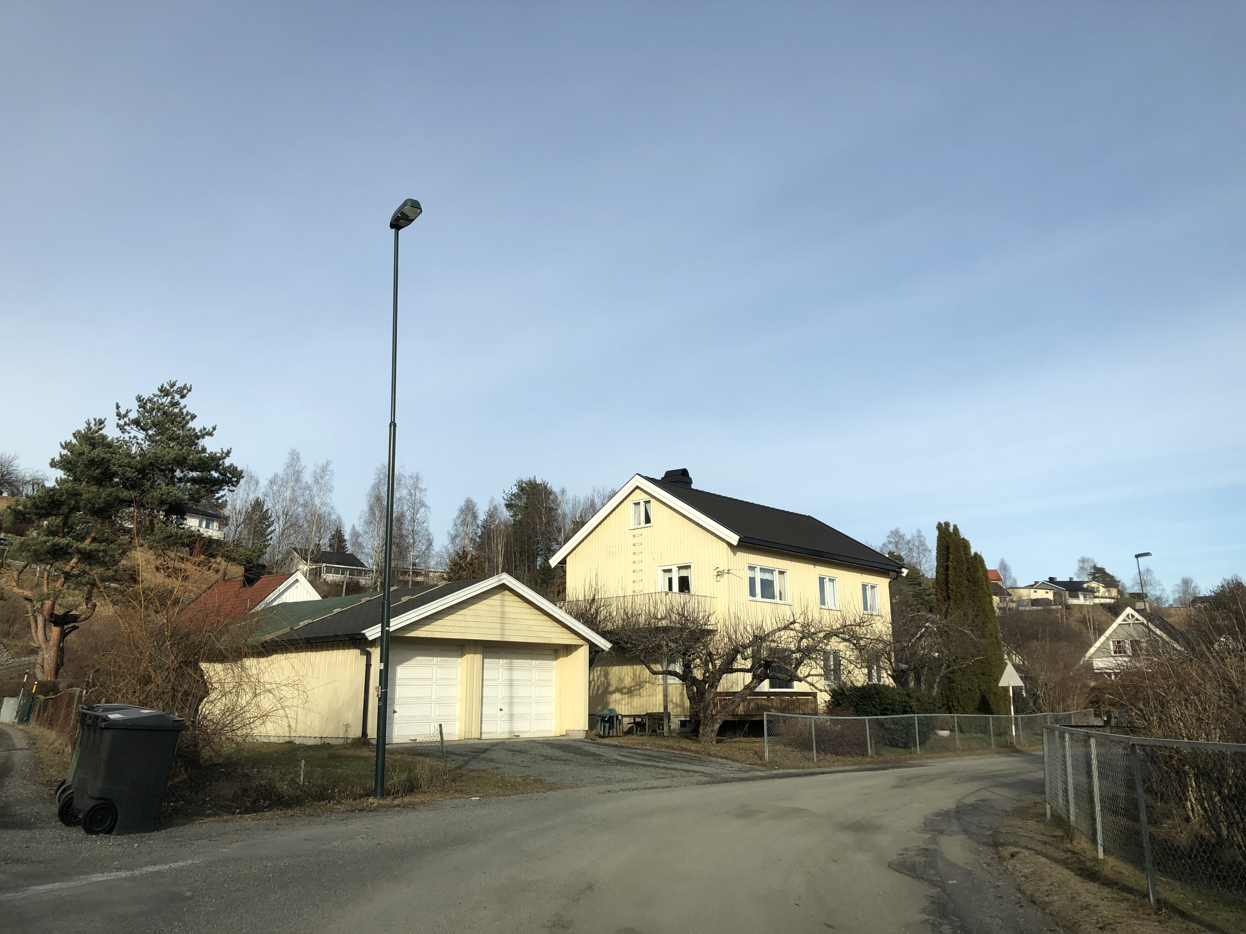 Indre Løkkavei 15, Hønefoss